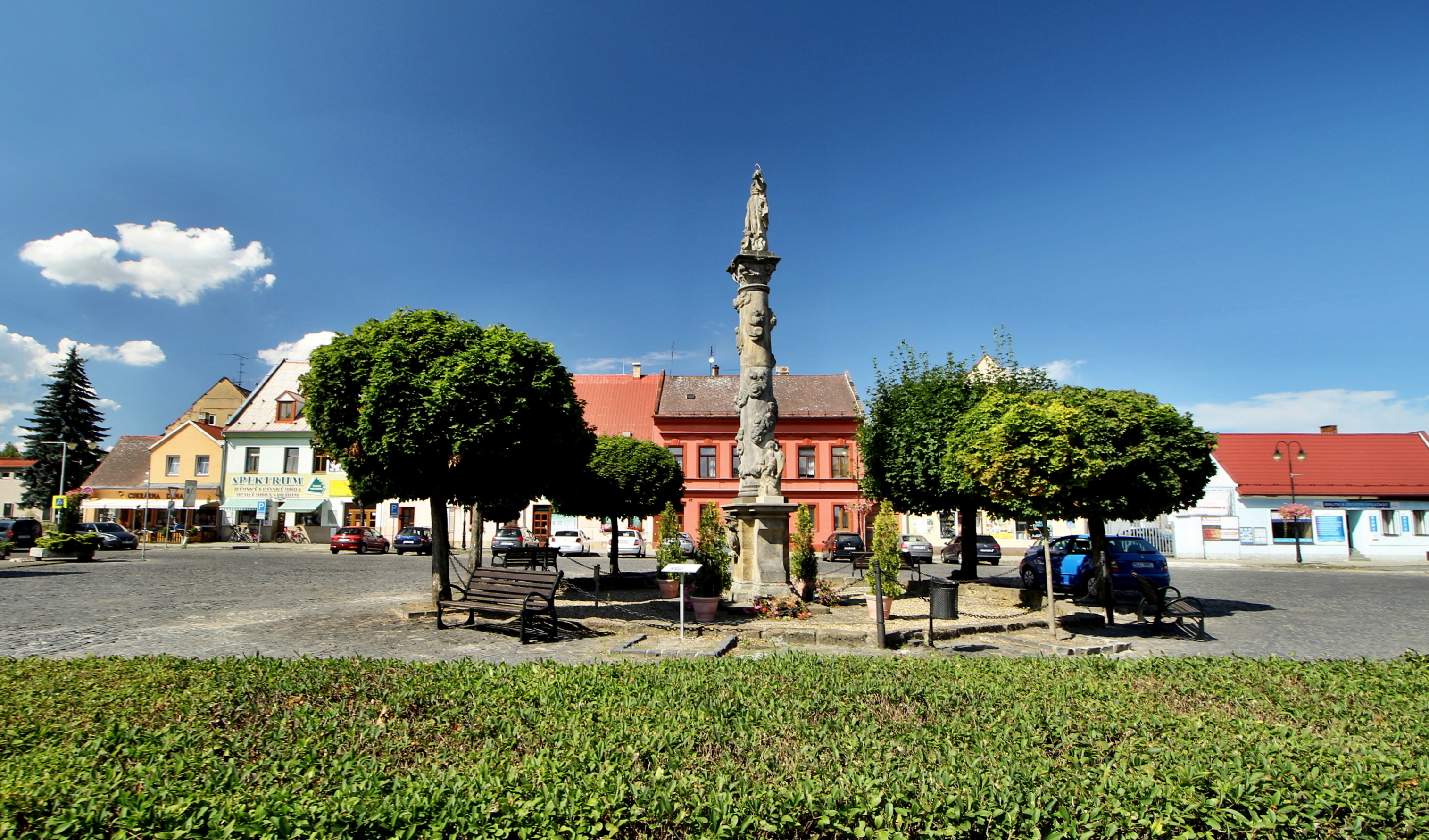 Náměstí 1. máje se sloupem Panny Marie v Mimoni